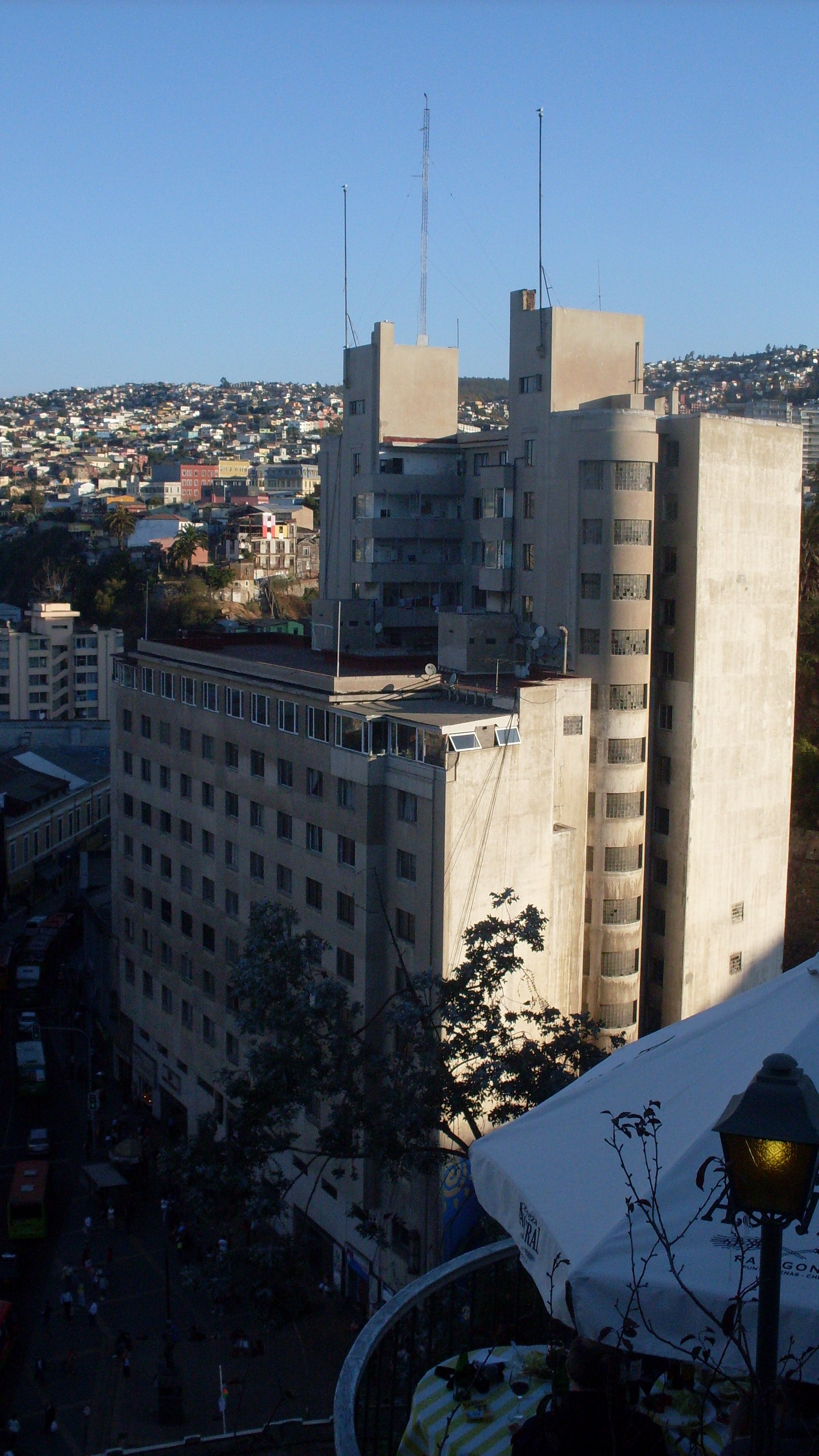 Edificio de la Cooperativa Vitalicia visto desde Paseo Atkinson.